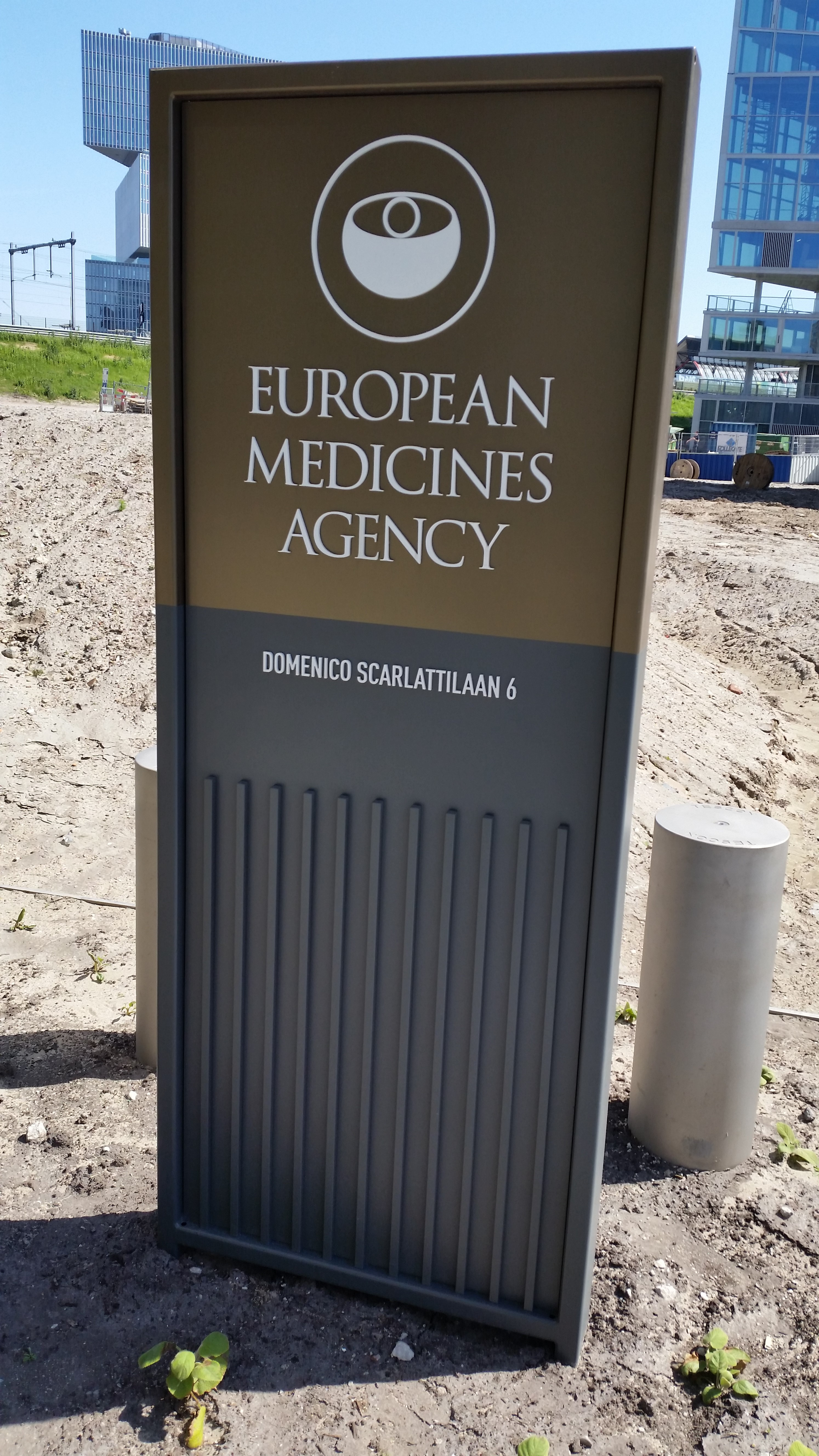 Bedrijvenbord aan de Domenico Scarlattilaan 6 Amsterdam van het European Medicines Agency